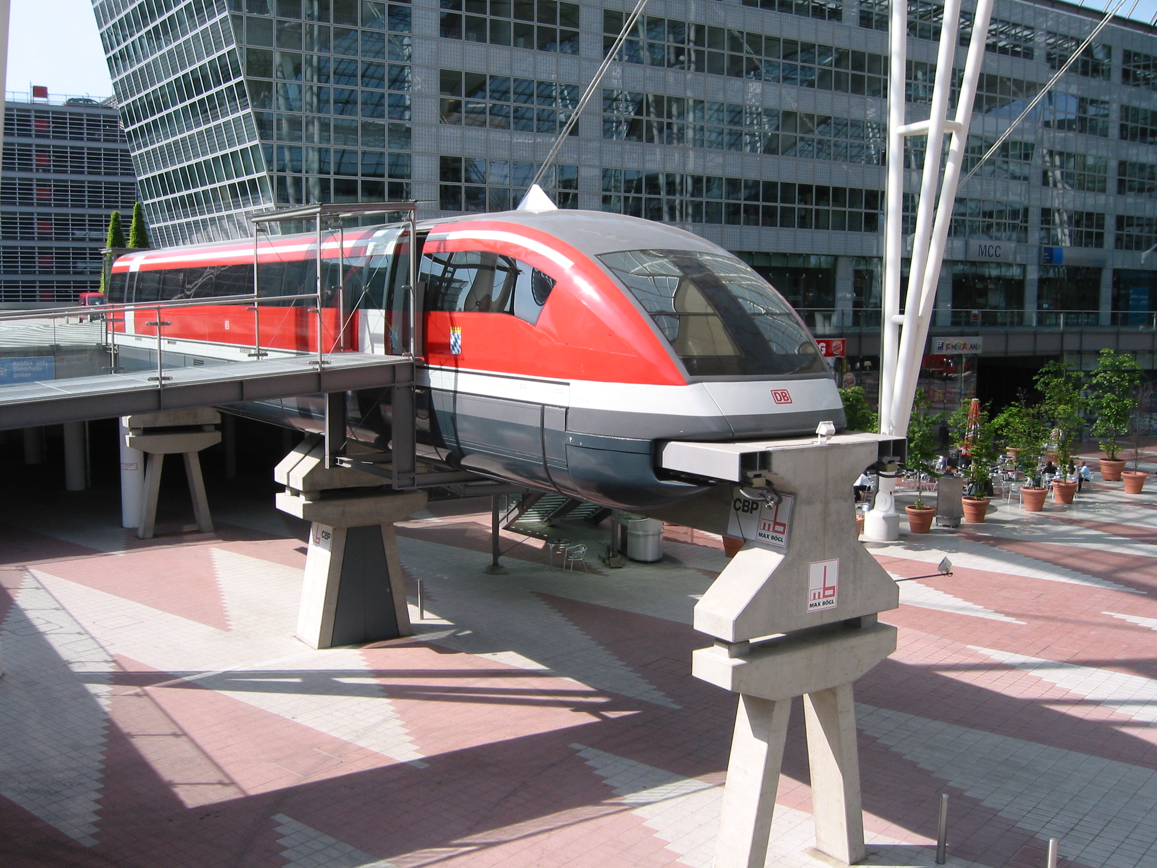 Transrapid-Teil zwischen dem 1. und 2. Terminal